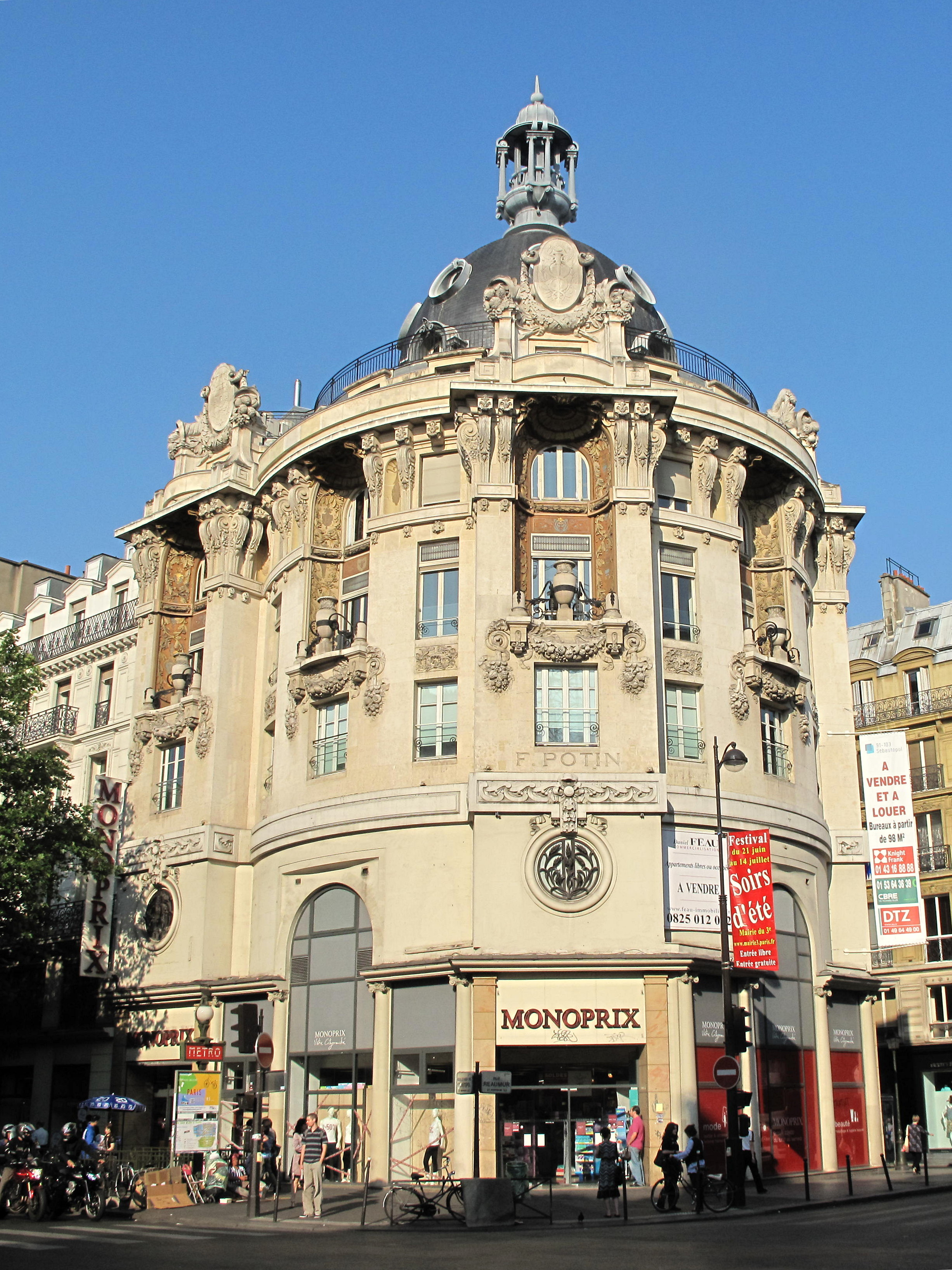 Siège de l'ancienne société Félix Potin : Angle rue Réaumur et boulevard de Sébastopol, Paris 2e arr. en juin 2009